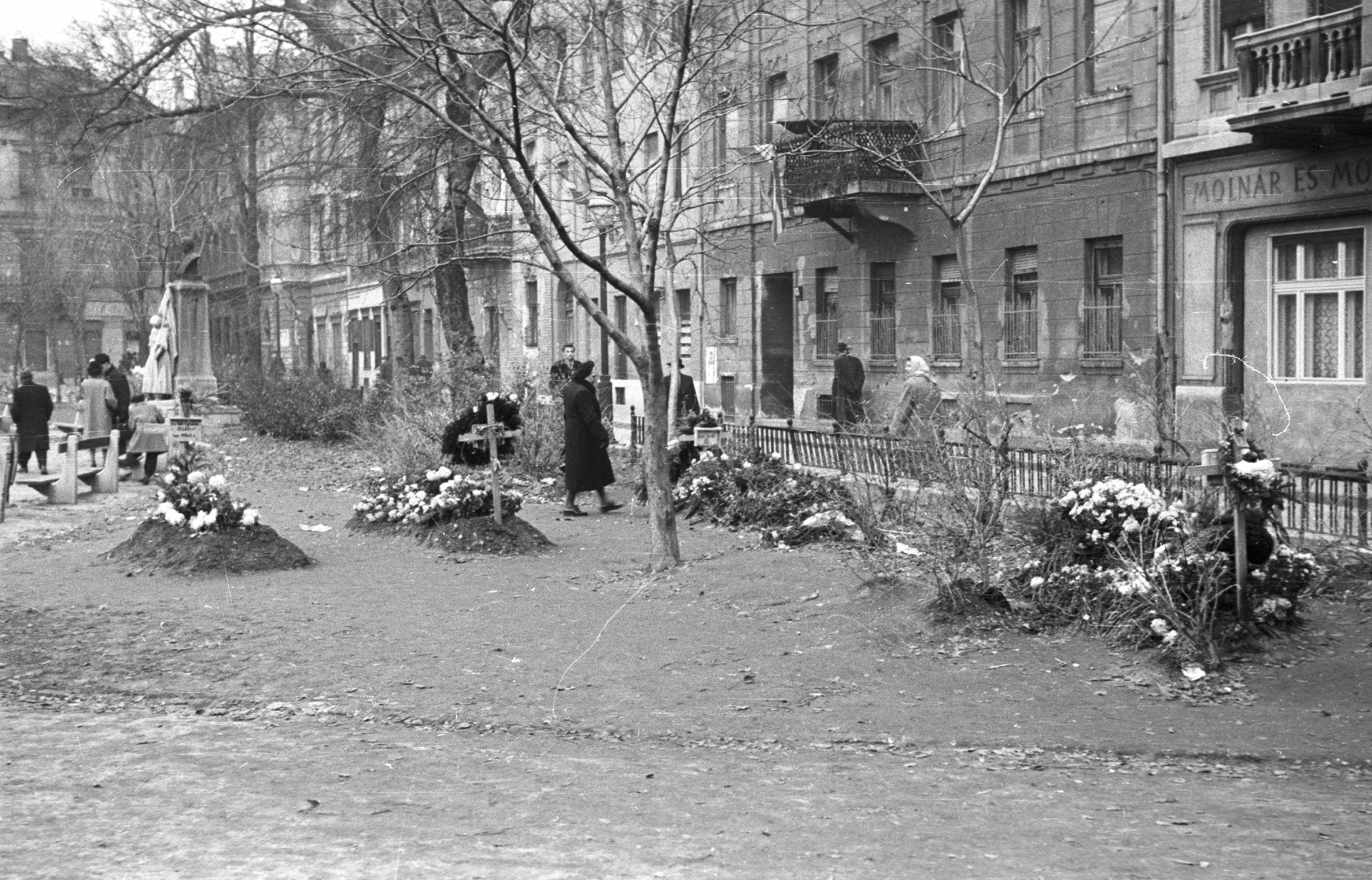 Sírok Károlyi-kertben 1956-ban, jobbra a Magyar utca házai.